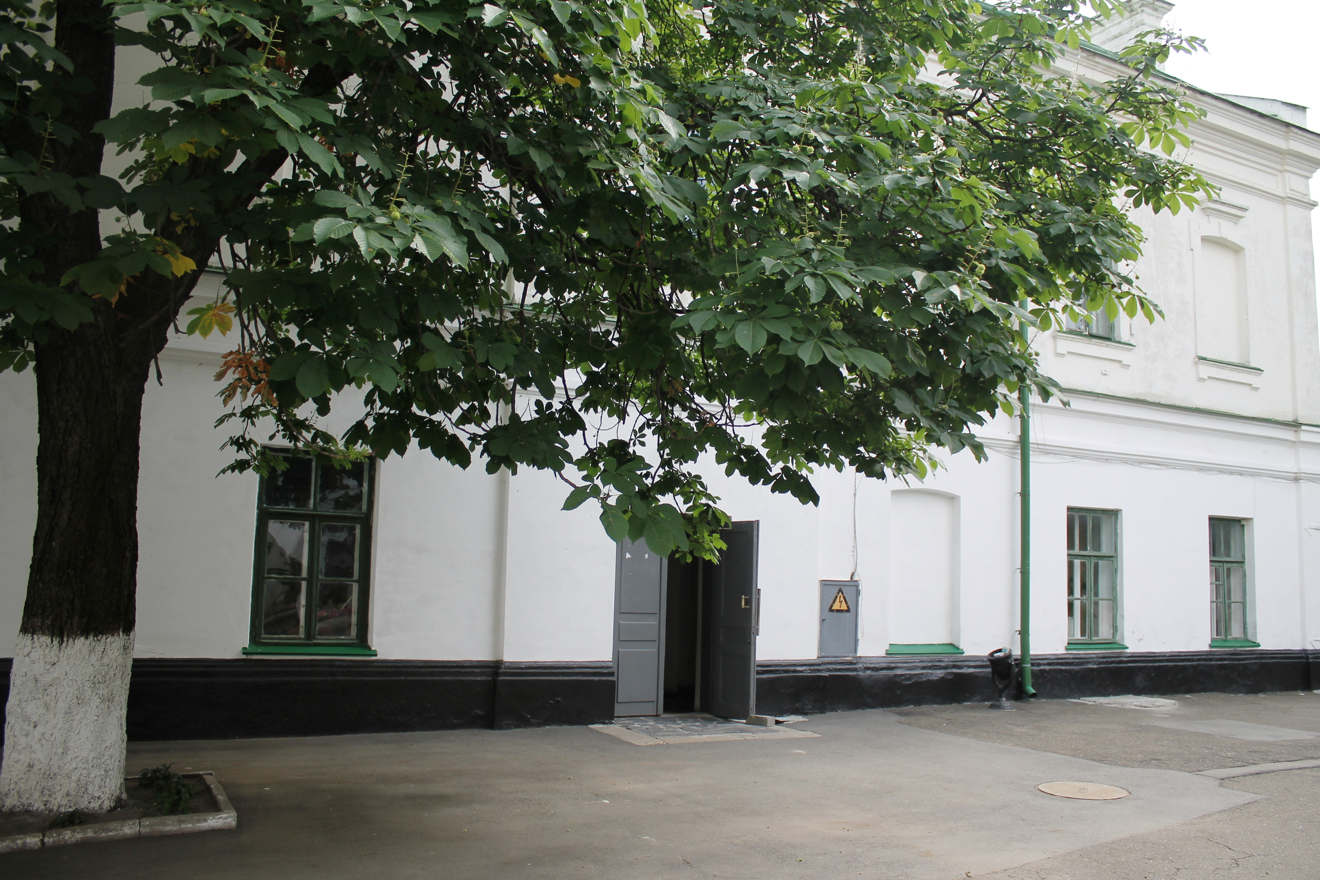 Будівля де розміщується Український центр культурних досліджень